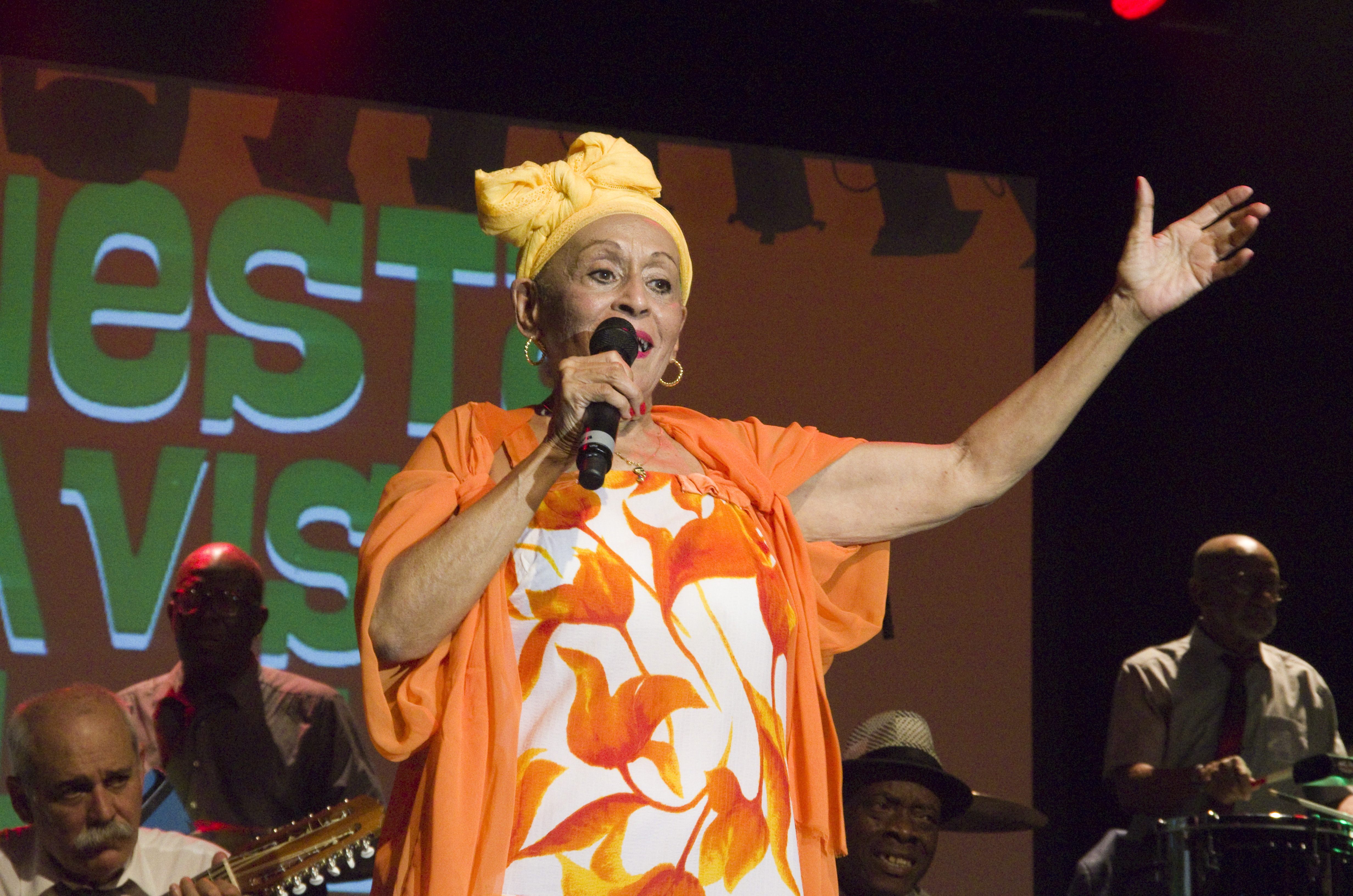 Das Zelt-Musik-Festival 2015 in Freiburg im Breisgau. 06.07.2015 Orquesta Buena Vista Social Club Omara Portuondo